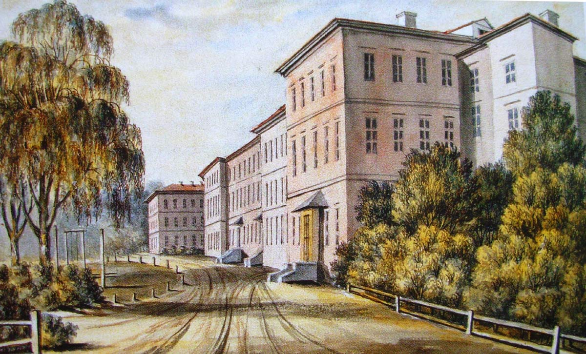 Institute of agriculture.label QS:Len,"Institute of agriculture."label QS:Lru,"Земледельческий институт."